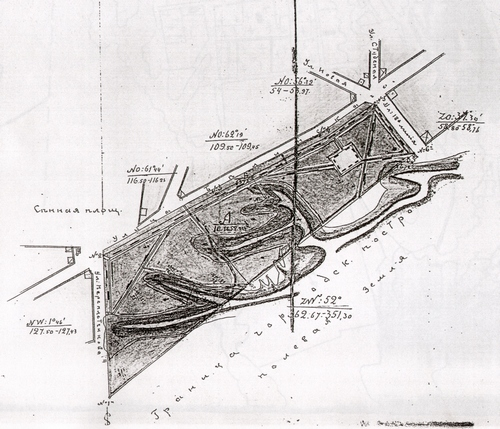 Фиксационный генплан Пушкинского сада, Нижний Новгород, 1913 г. (ЦАНО. Ф. 30. Оп. 39. Д. 8092)